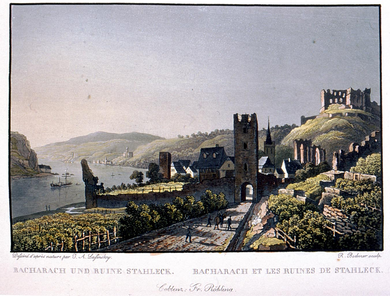 Altkolorierter Aquatintastich von R.Bodmer nach Vorlage von J.A. Lasinsky